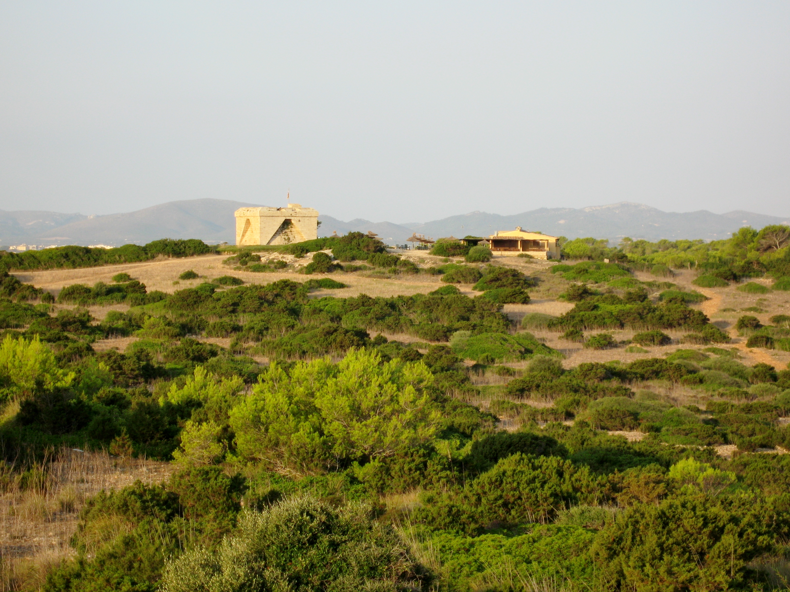 Es Castell de Sa Punta de n'Amer, Sant Llorenç des Cardassar, Mallorca, Spain